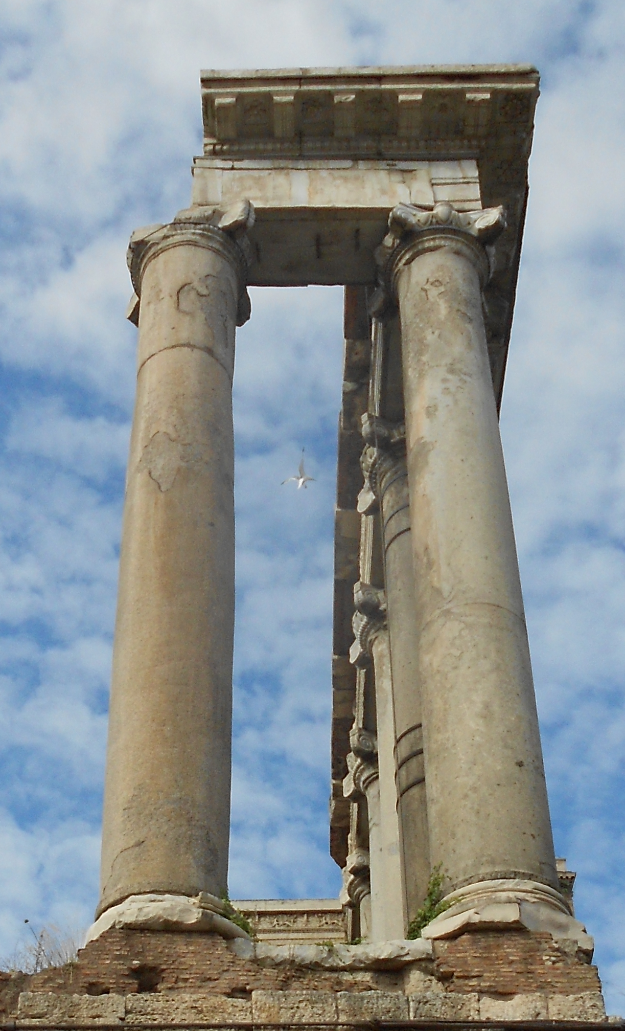 Seitenansicht (rechts) des Saturntempels